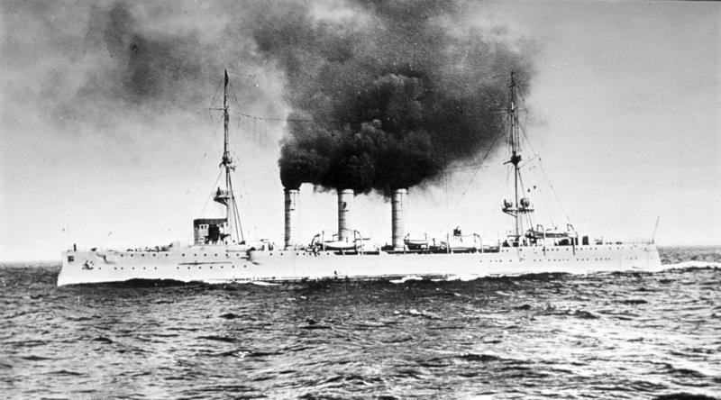 Kleiner Kreuzer "SMS Emden I" Kleiner Kreuzer "S.M.S. Emden I" der Dresden-Klasse auf See, Ansicht der Backbord-Seite